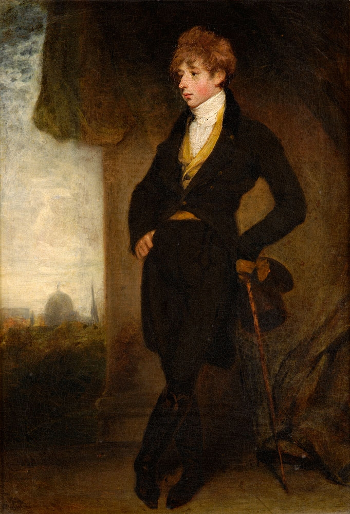 Ein Dandy in Rom